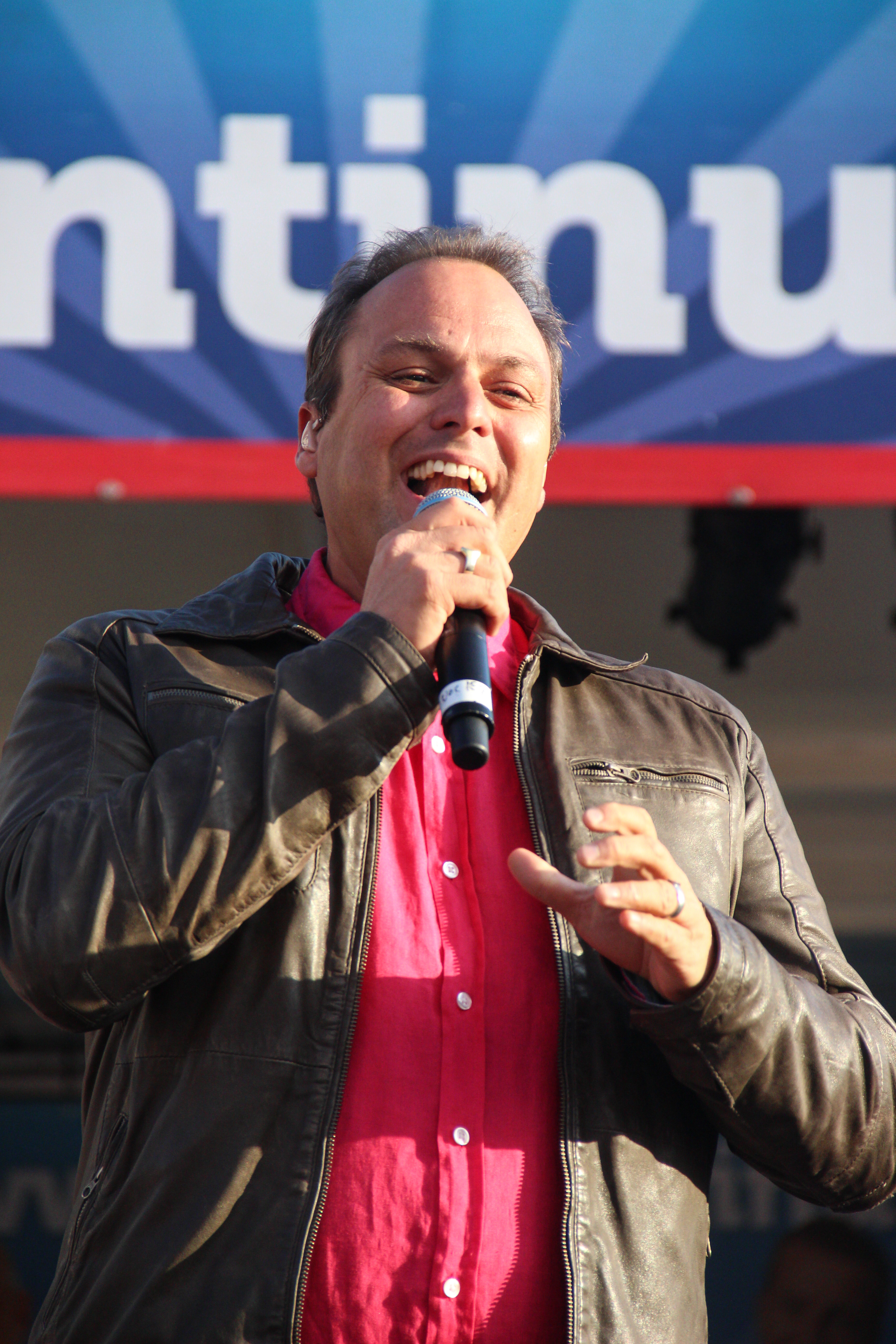 Frans Bauer tijdens Gouden Pijl in Emmen in 2014